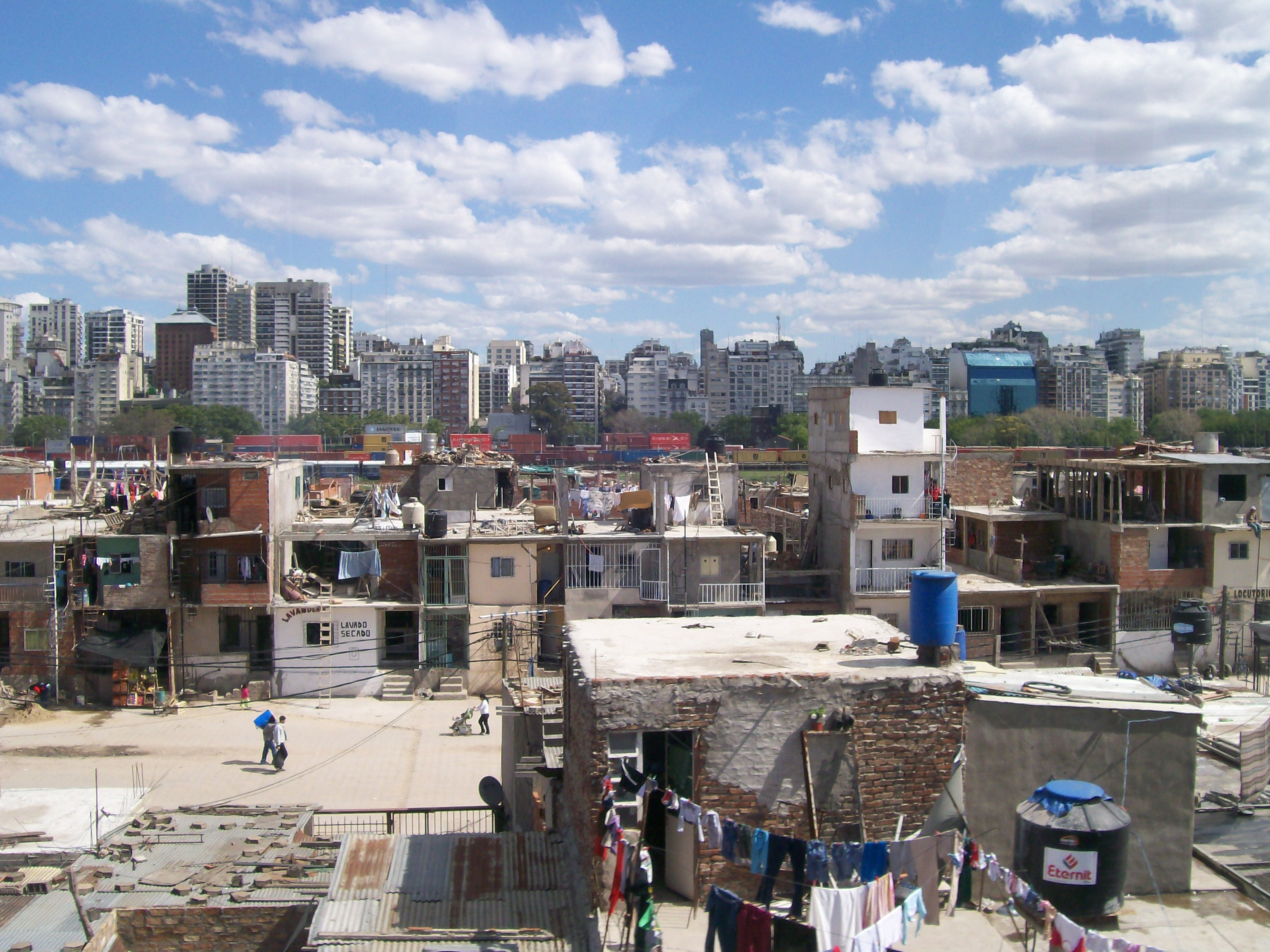 Villa 31, Retiro, Buenos Aires